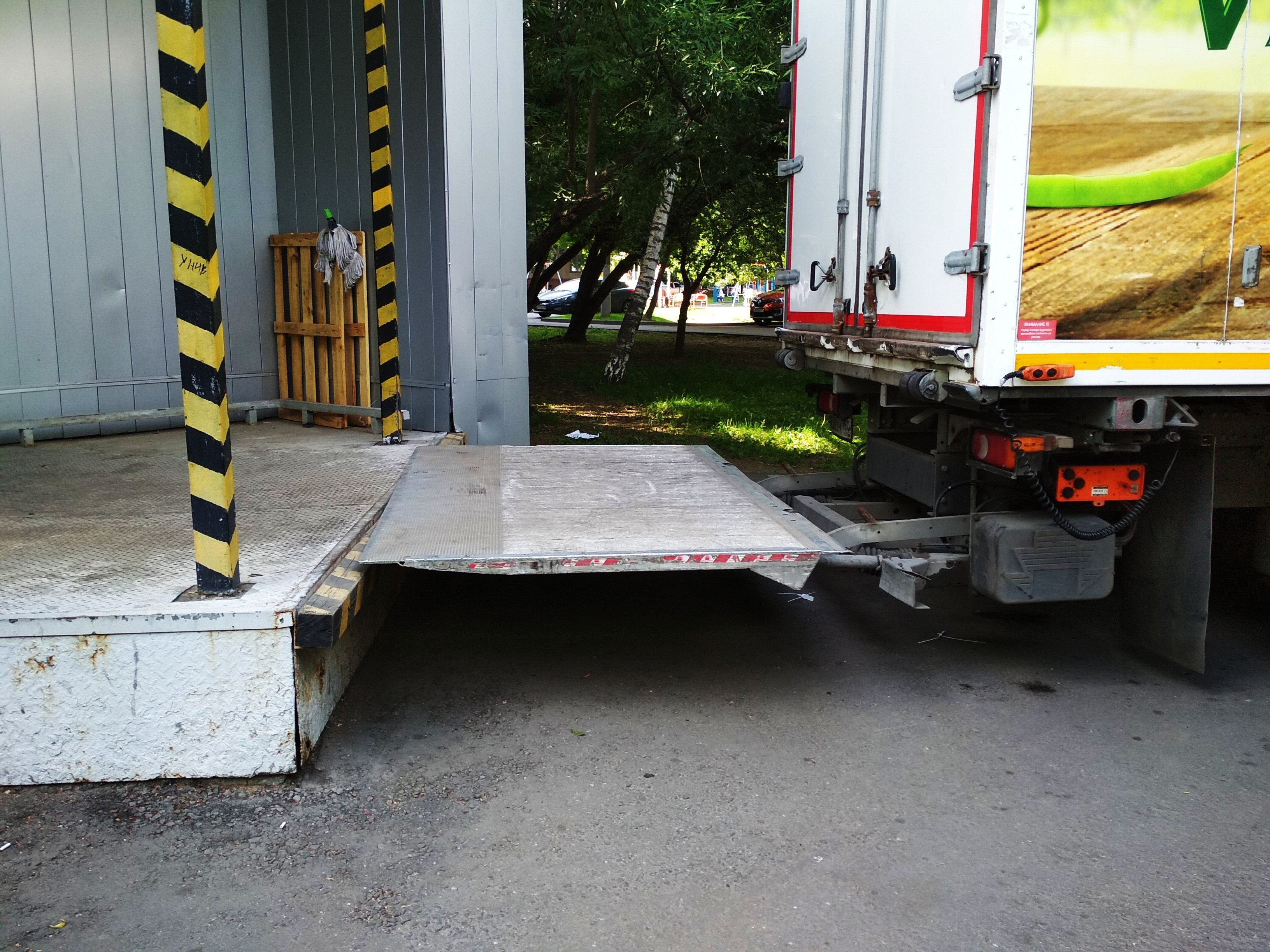 Автомобильная аппарель